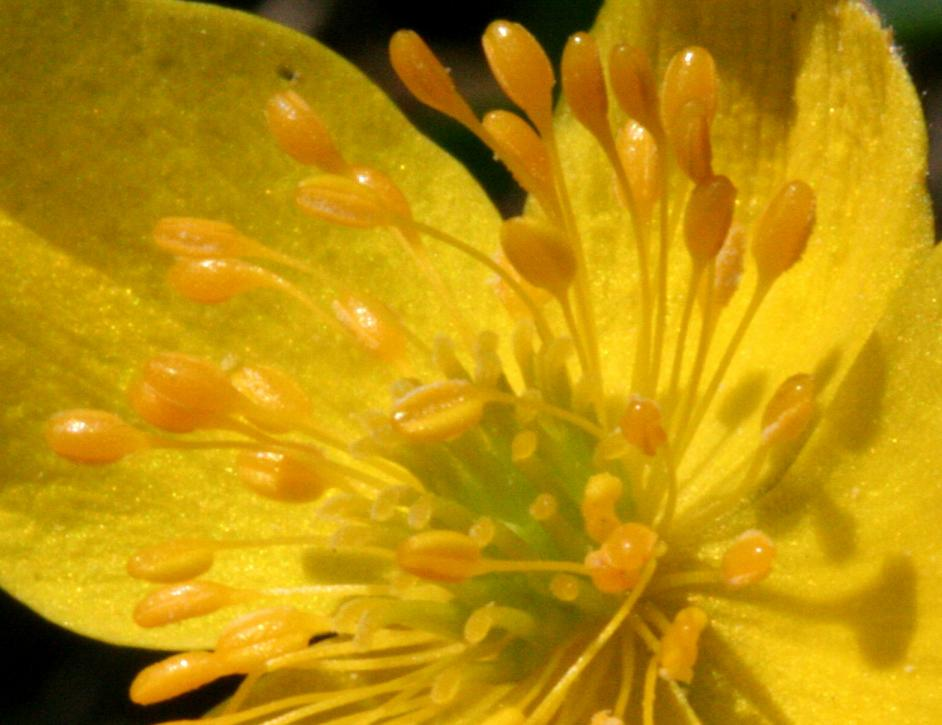 Anemone ranunculoides